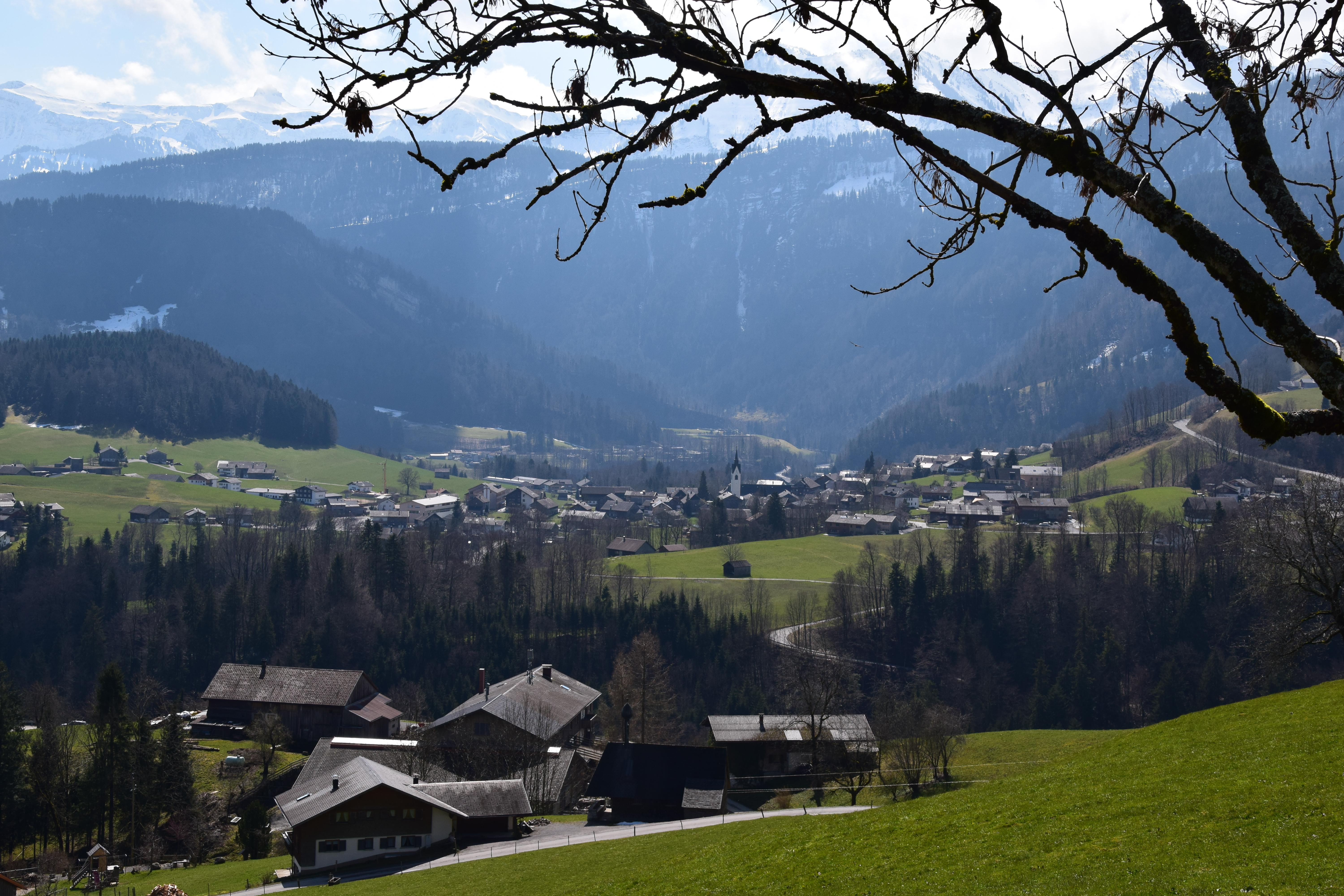 Blick auf Schwarzenberg vom Ortsteil Maien aus